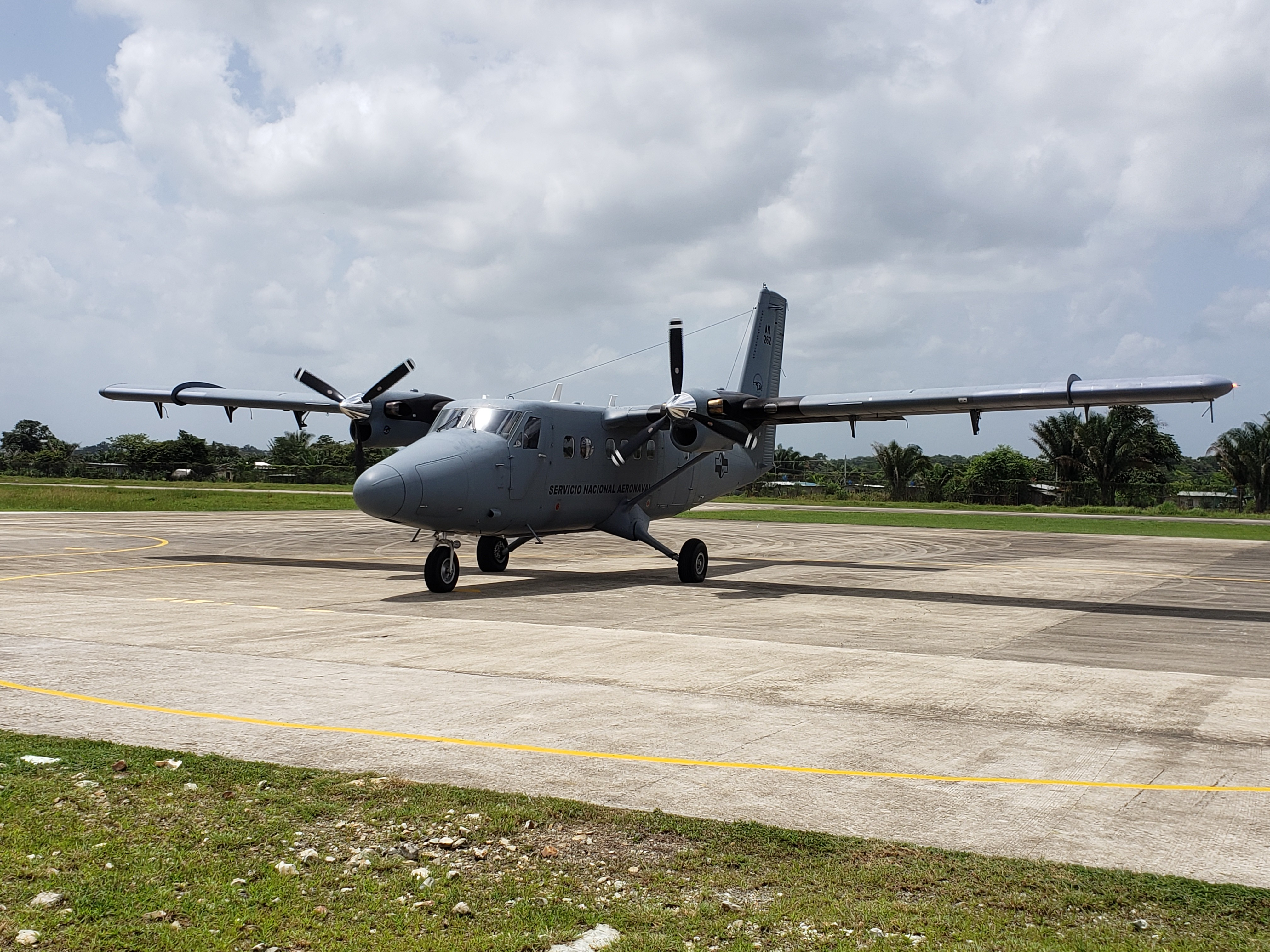 Avión de transporte del Servicio Nacional Aeronaval.